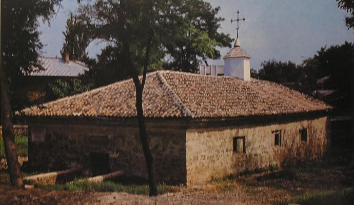 imaginea reprezintă Biserica din Căuşeni înainte de renovare this image represent the Church from Căuşeni, before its restauration